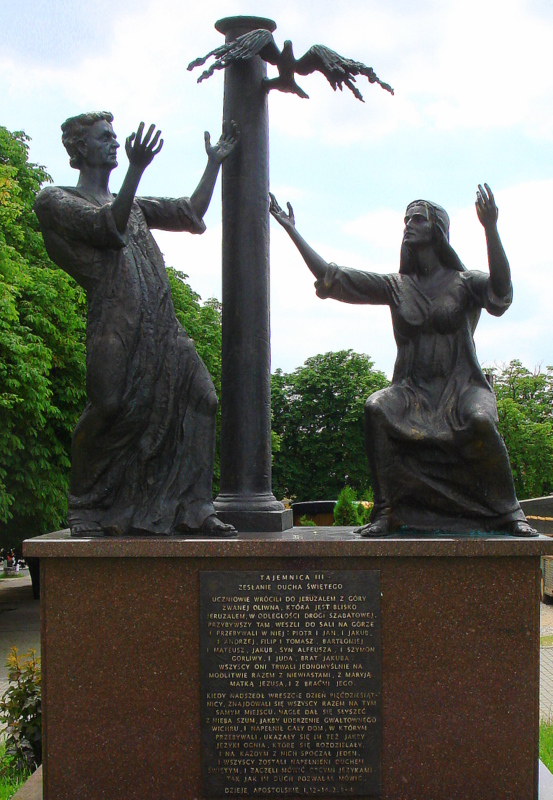 Częstochowa, zespół klasztorny paulinów na Jasnej Górze